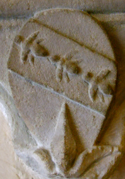 Palazzo Pannocchieschi a Firenze, secondo atrio: stemma Vespucci.